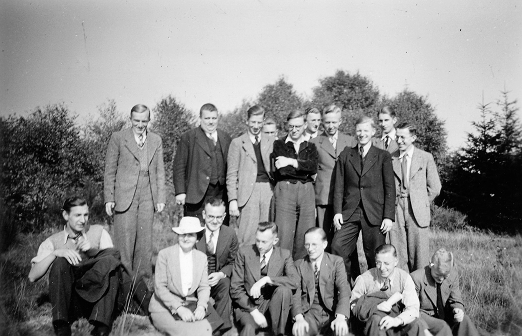 Kirchliche Hochschule der Bekennenden Kirche in Elberfeld: Teilnehmer einer Freizeit in Kleve, mit Pfarrer Ludwig Steil, der 1937 im KZ Dachau verstarb. Abgabe: Wolfgang Scherffig, 18.12.1998., AEKR Düsseldorf 8 SL 046 (Bildarchiv), 80045_01